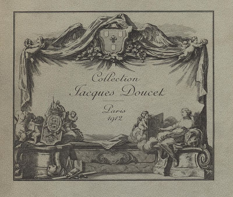 Titre gravé du catalogue de la vente de la collection Jacques Doucet par Maître Fernand Lair-Dubreuil